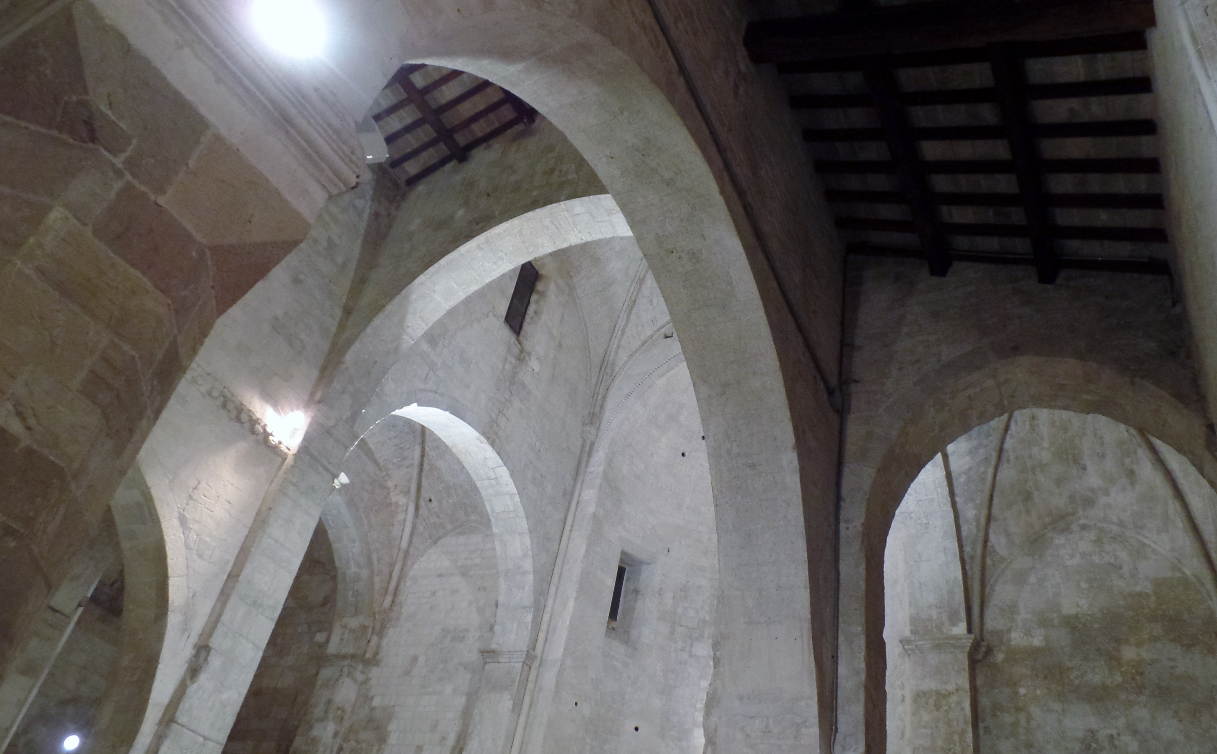 Santa Maria della Piazza Ancona incrocio arcate